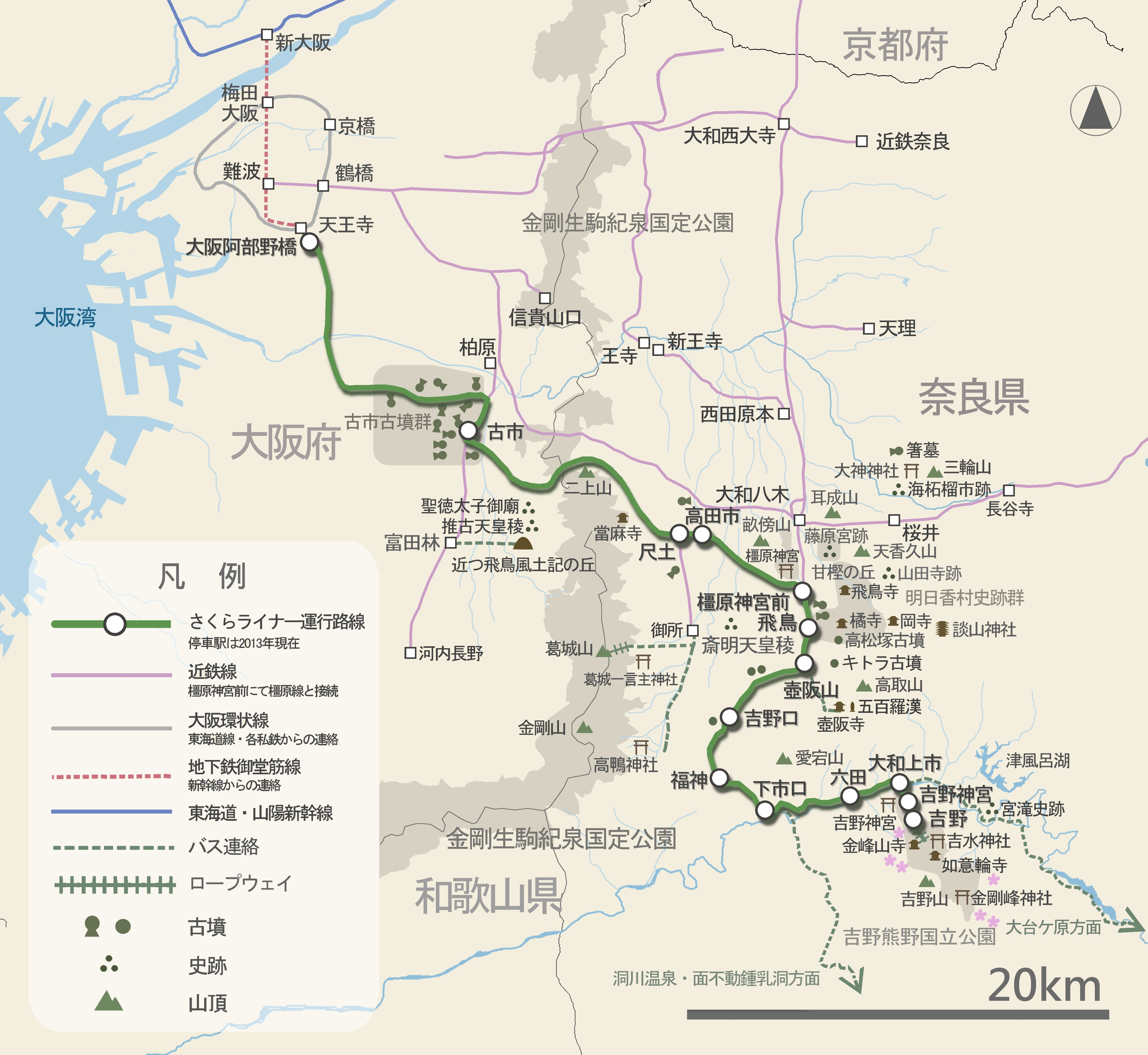 南大阪線・吉野線名所旧跡を描いた路線図。特急停車駅は2013年現在。